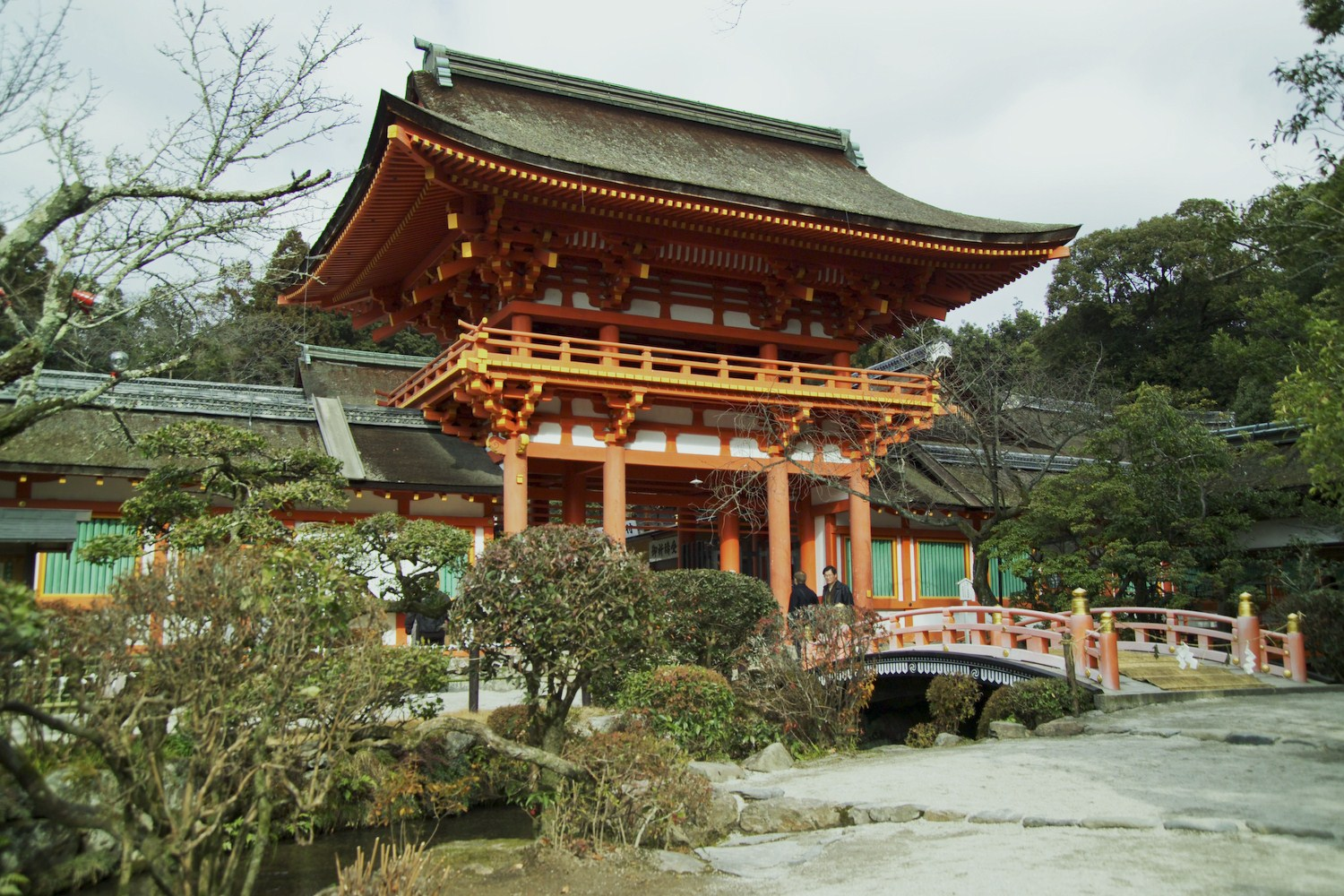 This photograph was taken at the Kamigamo Shrine, formally Kamowakeikazuchi Shrine (賀茂別雷神社, kamowakeikazuchi jinja) in Kyoto (京都), Japan.